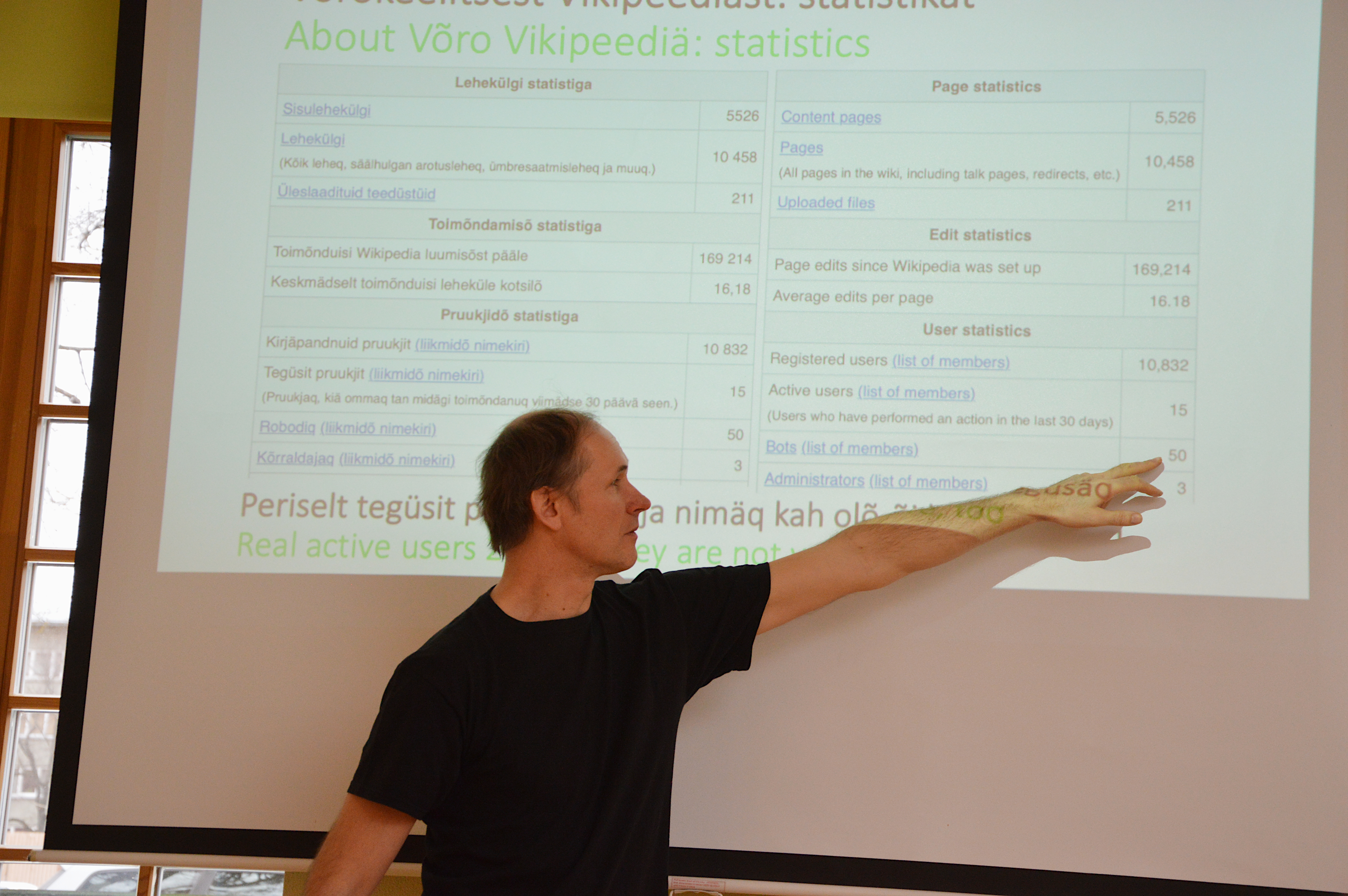 Sulev Iva rääkimas võrukeelsest Vikipeediast. IV soome-ugri Vikipeediate seminar.